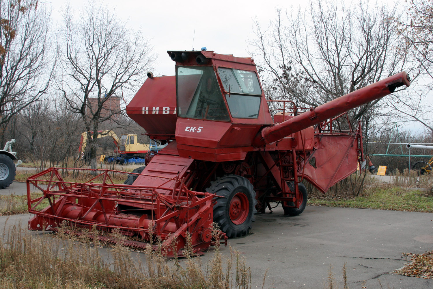 Комбайн СК-5 в Саратове на Соколовой горе